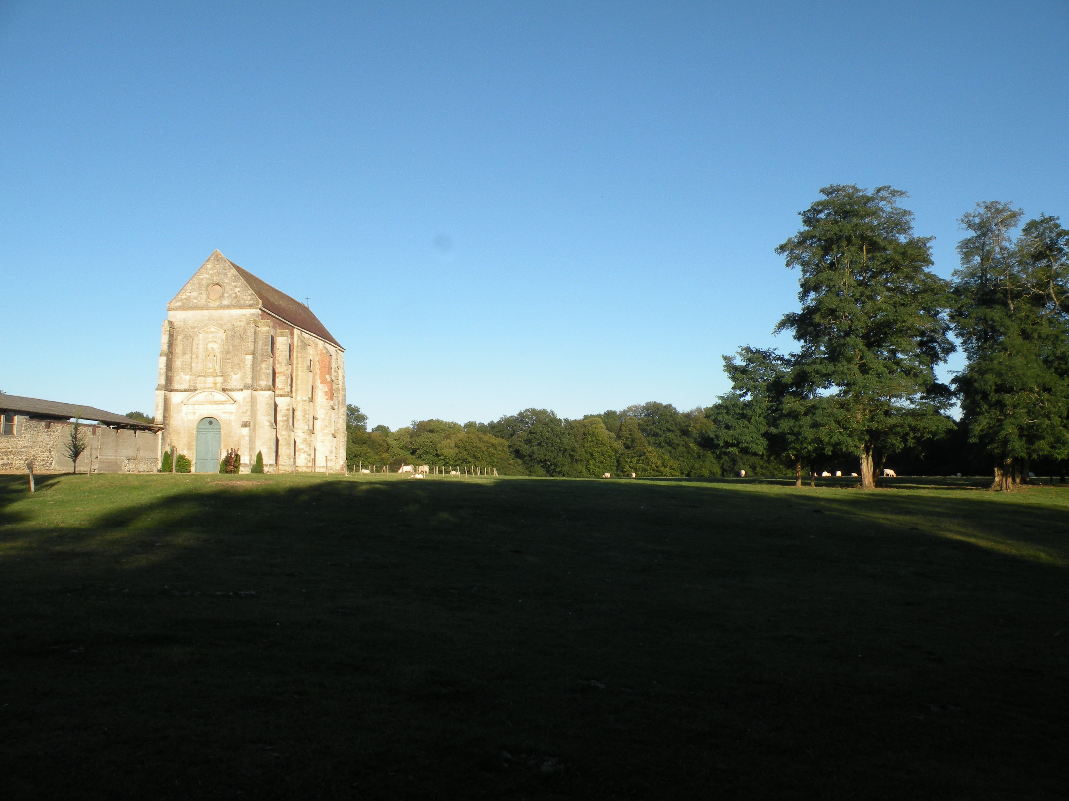 abbaye Saint-Nicolas de Marcheroux